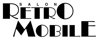 Logo Rétromobile